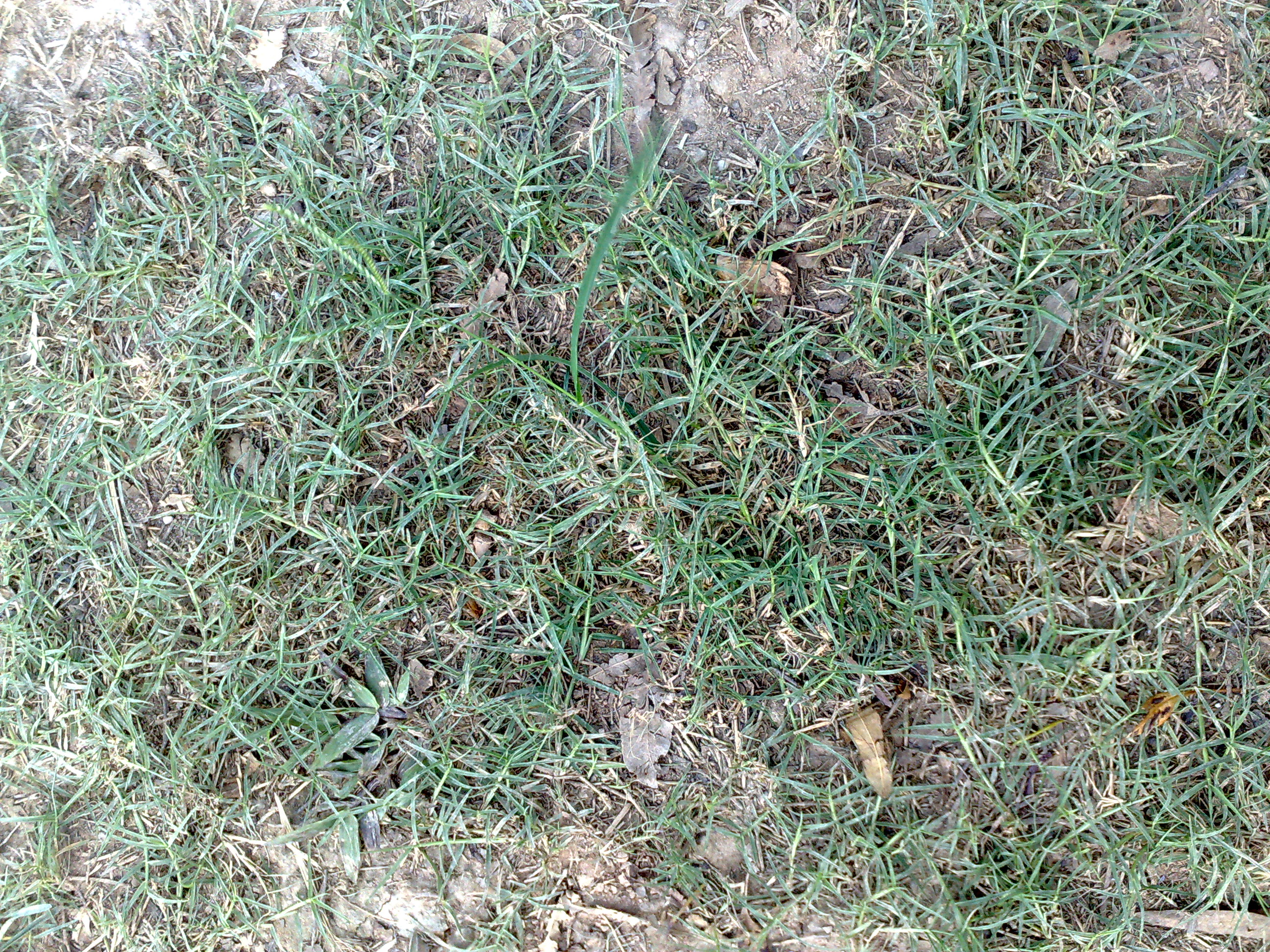 Hình cỏ gà mọc hoang, do tôi tự chụp và tải lên để minh họa cho bài viết Cỏ gà.